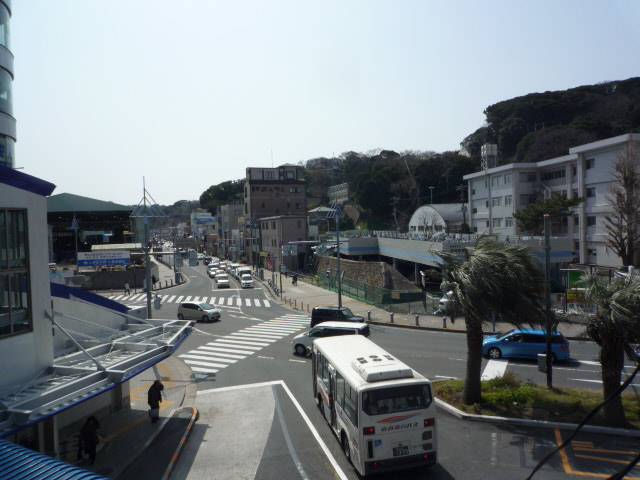 浦賀駅前を撮影